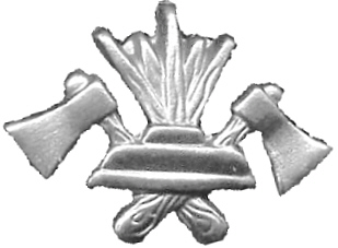 Własna praca Kwz